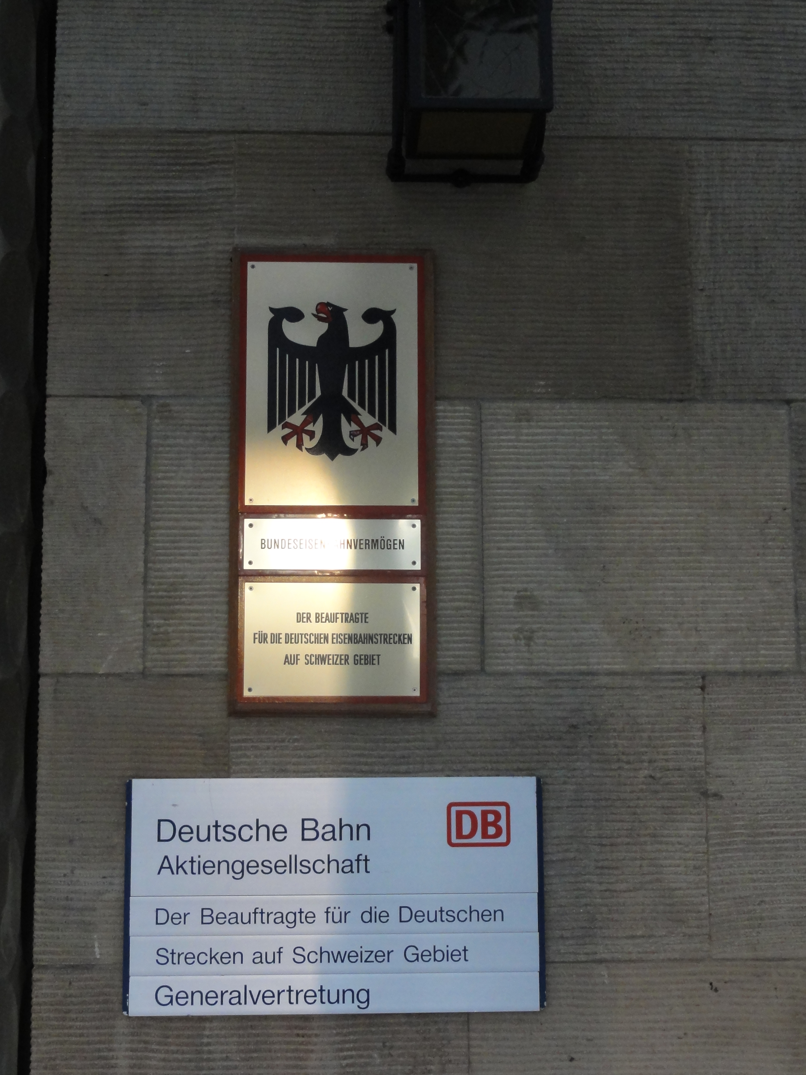 Basel — Badischer Bahnhof